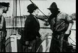 escena de la película de Charles Chaplin Shanghaied (1915).